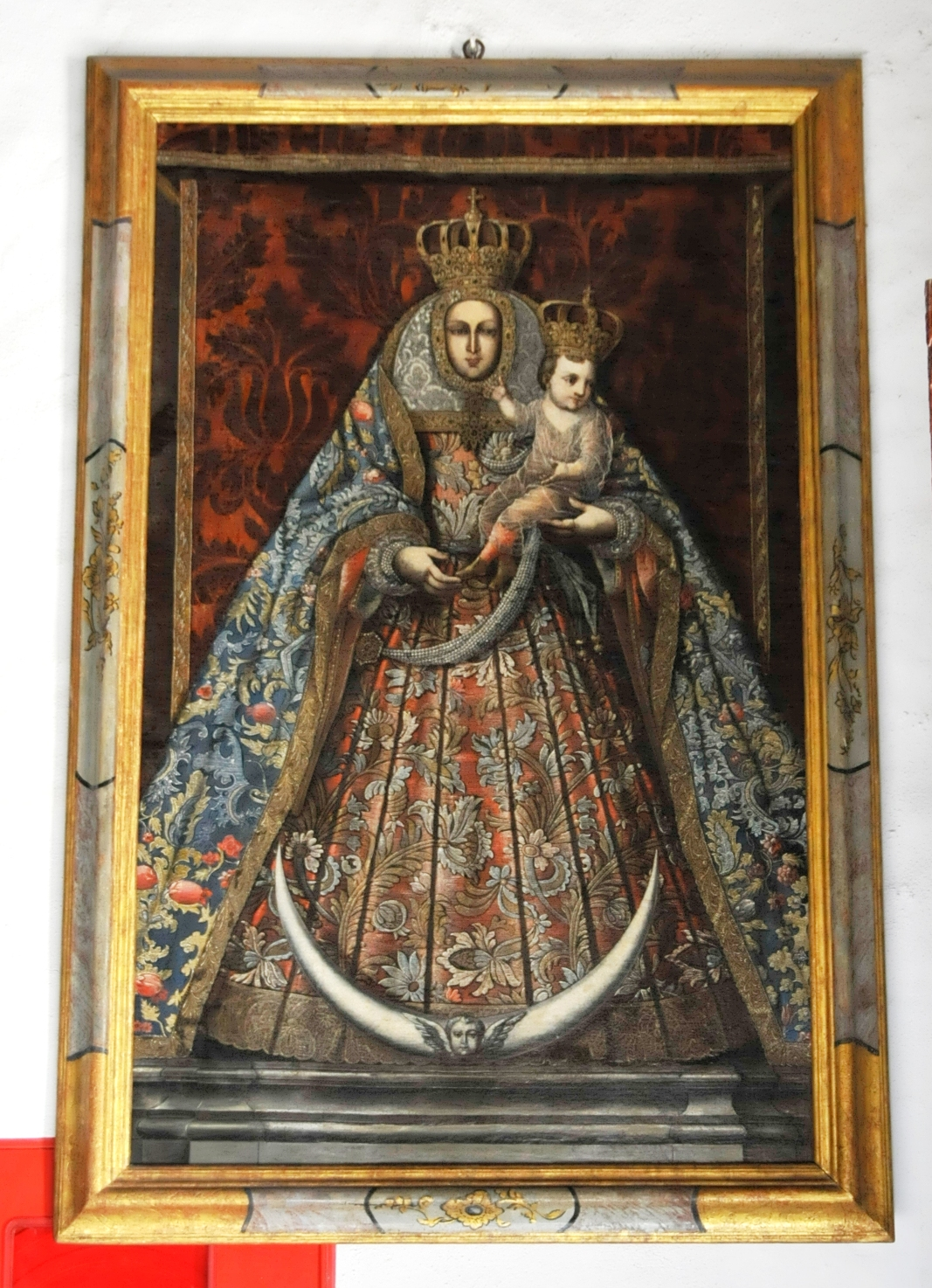 La Gomera, San Sebastian, Kirche La Asunción